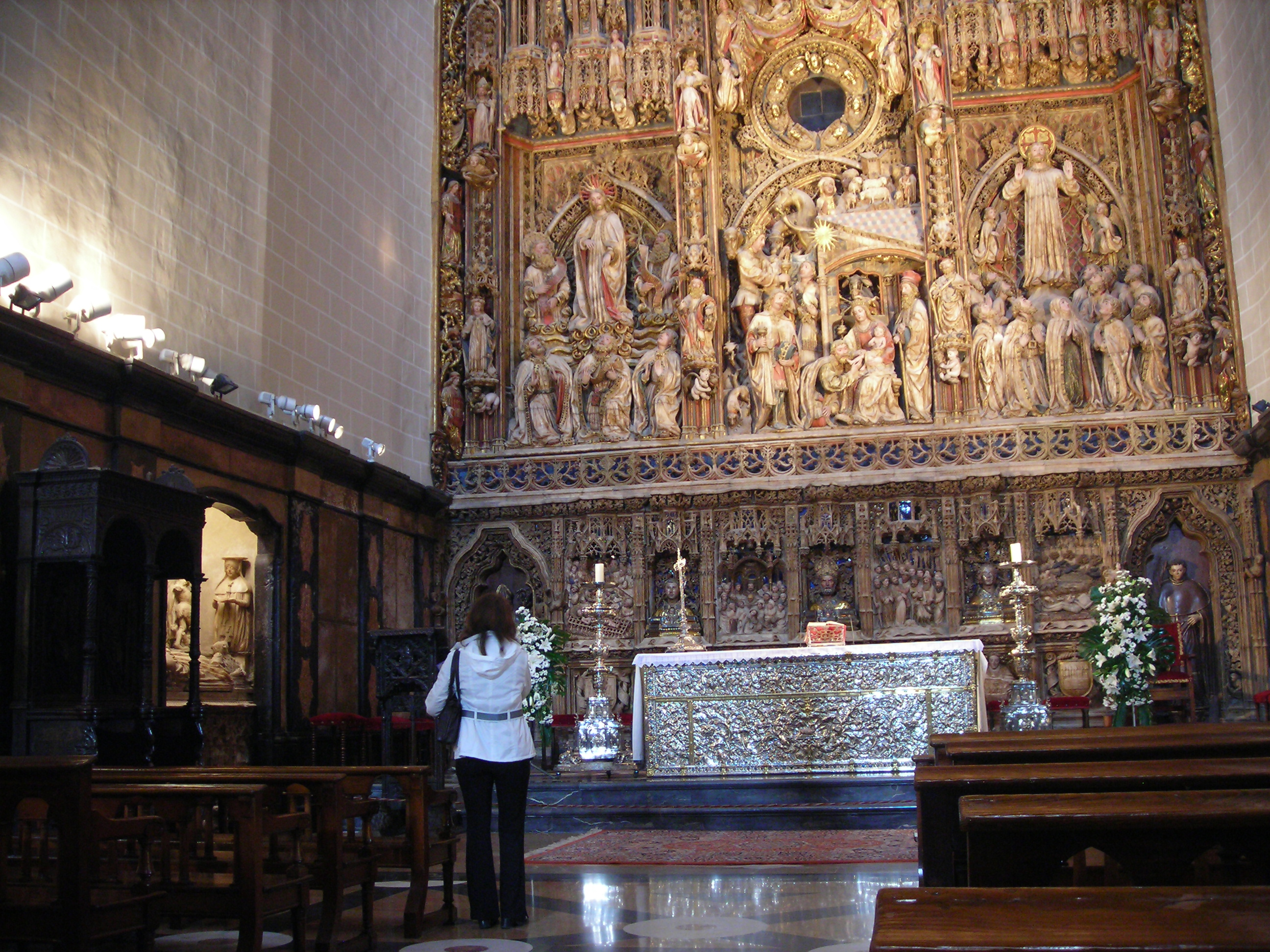 Alabasteraltar, La Seo, Zaragoza